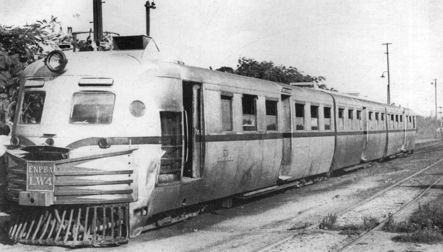 El LW4 con inscripciones del Ferrocarril Nacional Provincia de Buenos Aires en Tapiales procedente de Libertad.